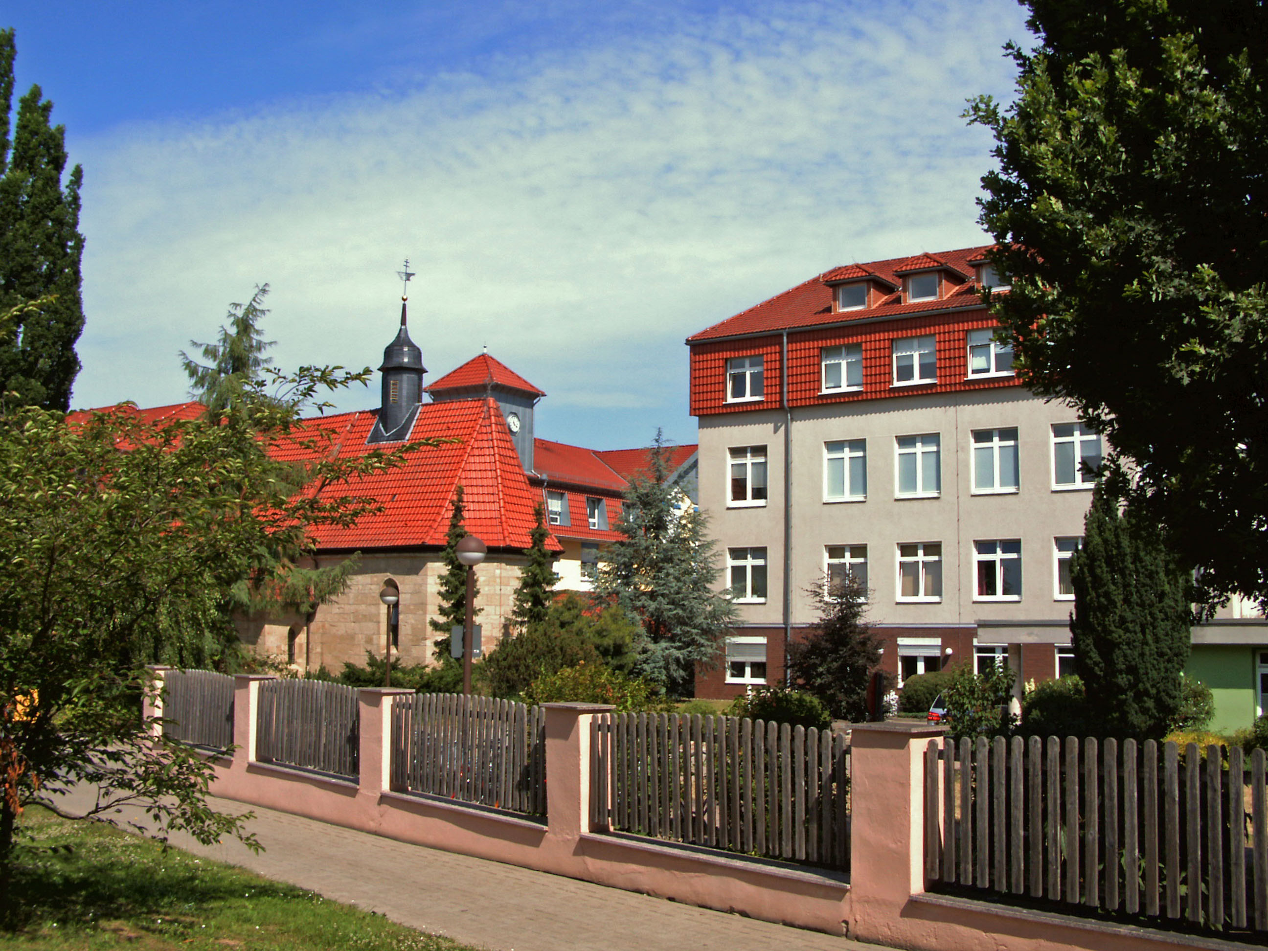 Krankenhaus St. Martini in Duderstadt, Landkreis Göttingen